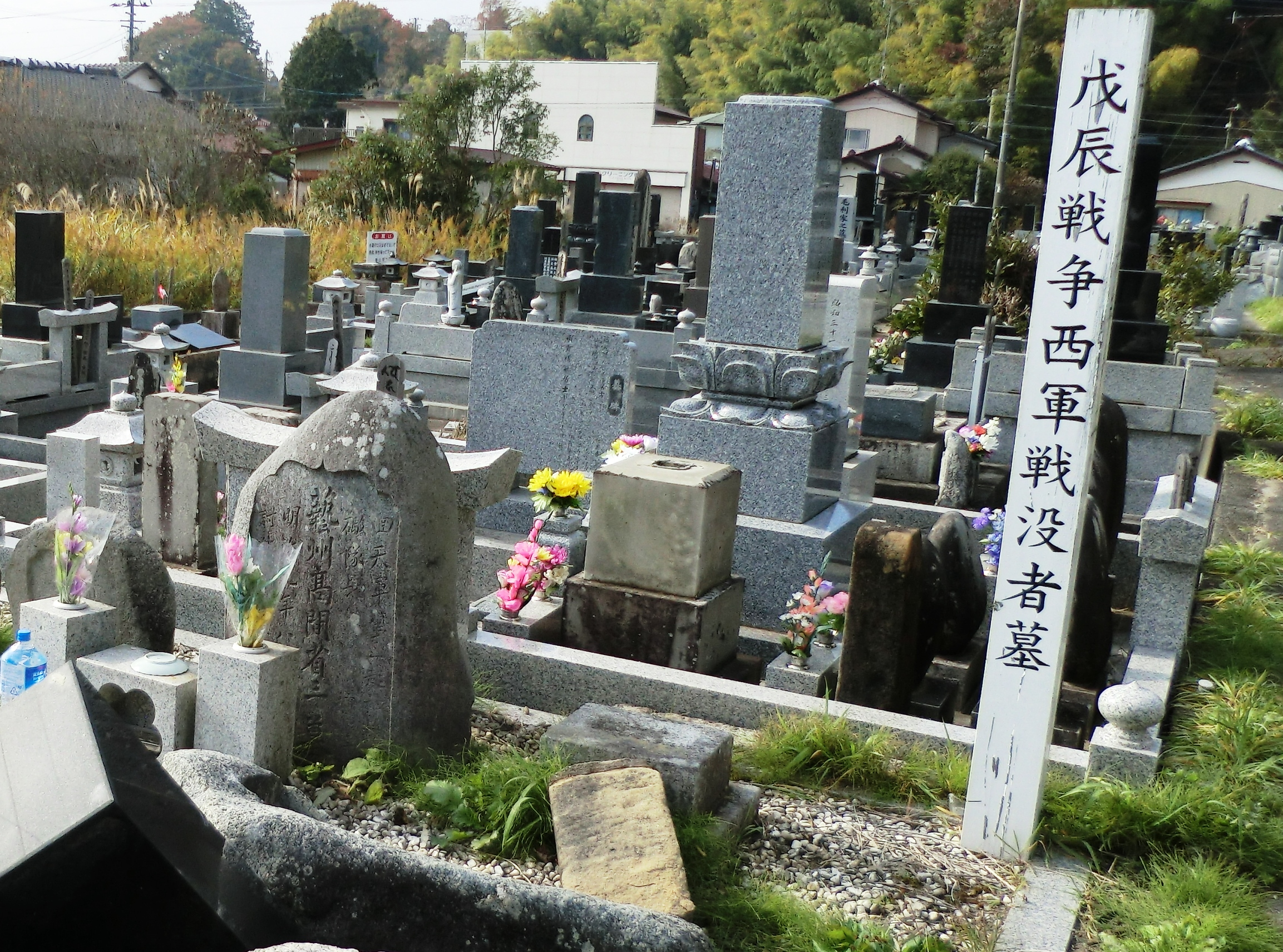 神機隊の砲隊長として高間省三は奥州戦争に参加。慶応４年８月１日、浪江の戦いで、砦に一番乗りした瞬間、敵弾が頭部に当たり戦死する。現在は福島・双葉町の自性院に眠るが、放射能汚染地で参拝がむずかしい。